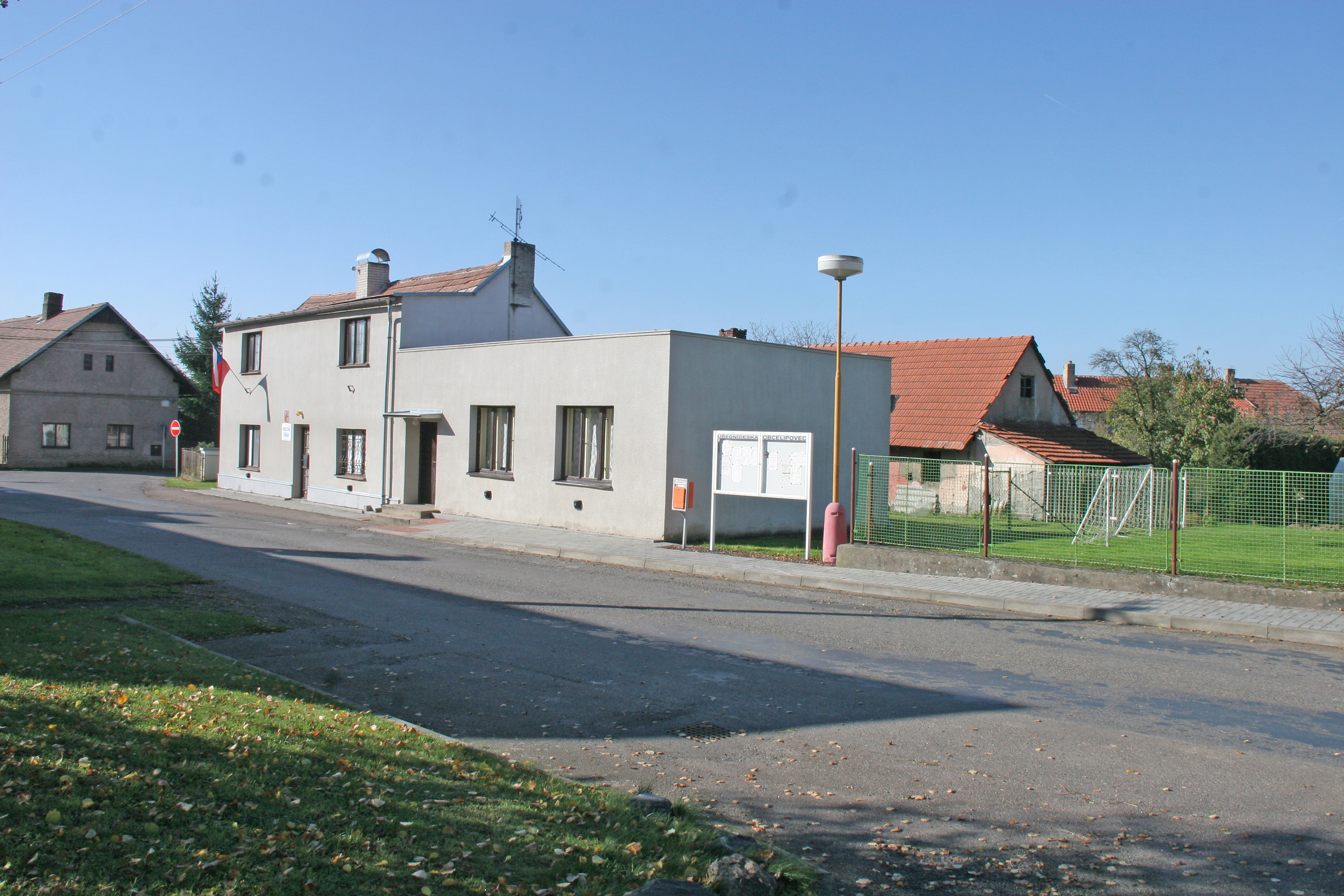 Lipovec obecní úřad